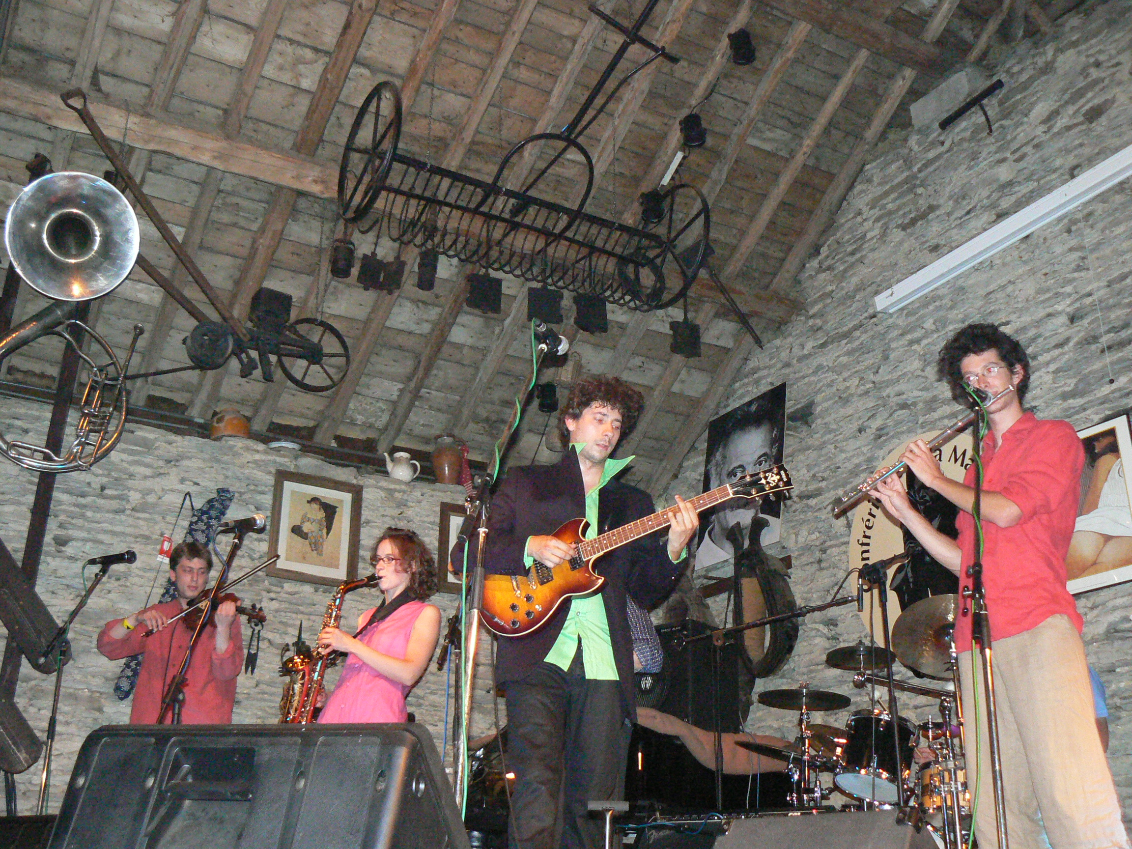 L'ensemble Funk Sinatra (B) le 4 août 2007, dans le club « La Madelone » lors du Jazz & Blues Festival de Gouvy (Belgique)